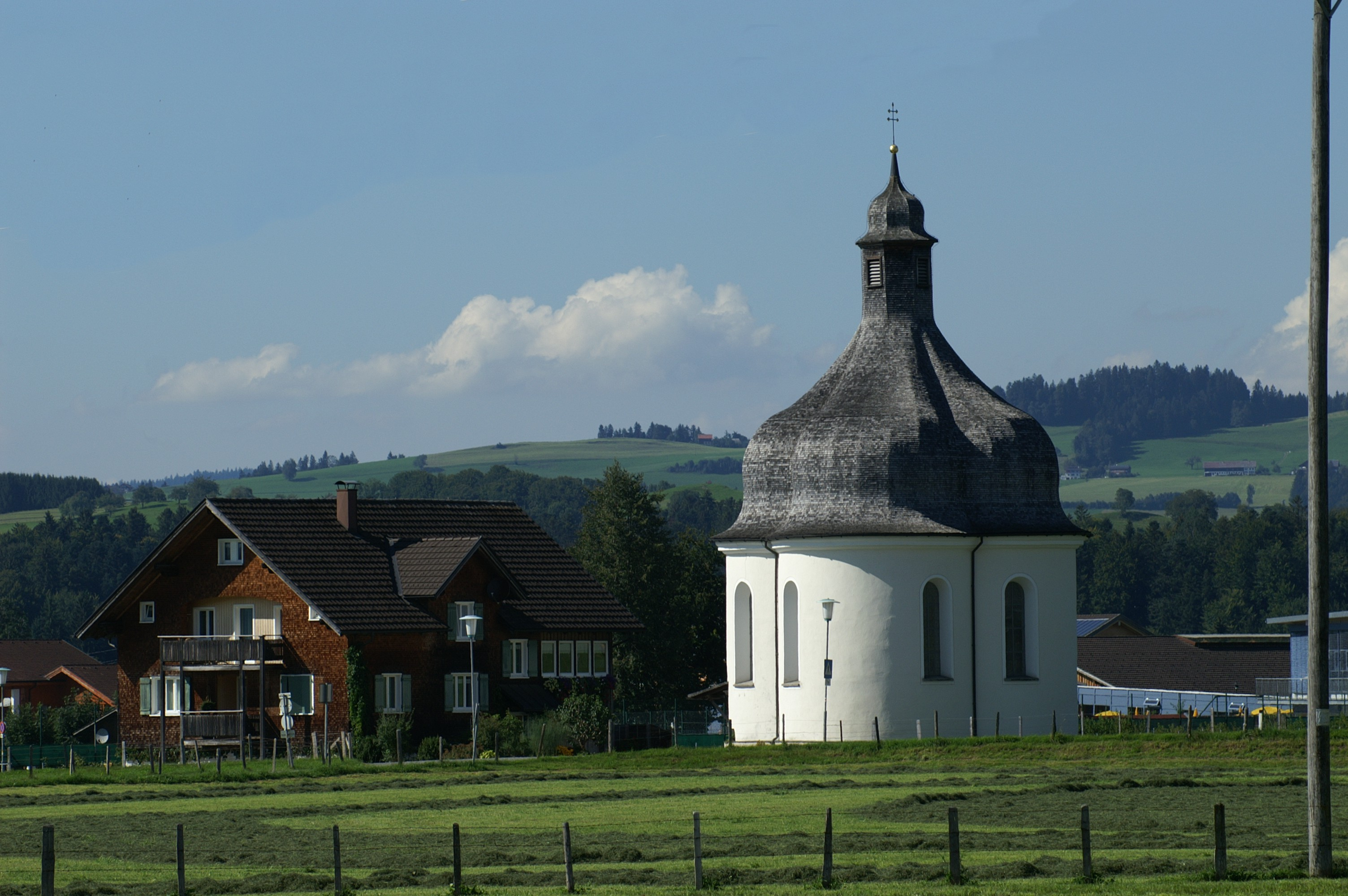 die St. Anna-Kapelle erbaut im Barockstil 1722 in Lingenau im Bregenzerwald , Vorarlberg. Veröffentlicht: Georg Kessler in "Freizeit im Ländle, Die schönsten Ausflugziele in Vorarlberg ISBN 978-3-7022-3068-5 2010.